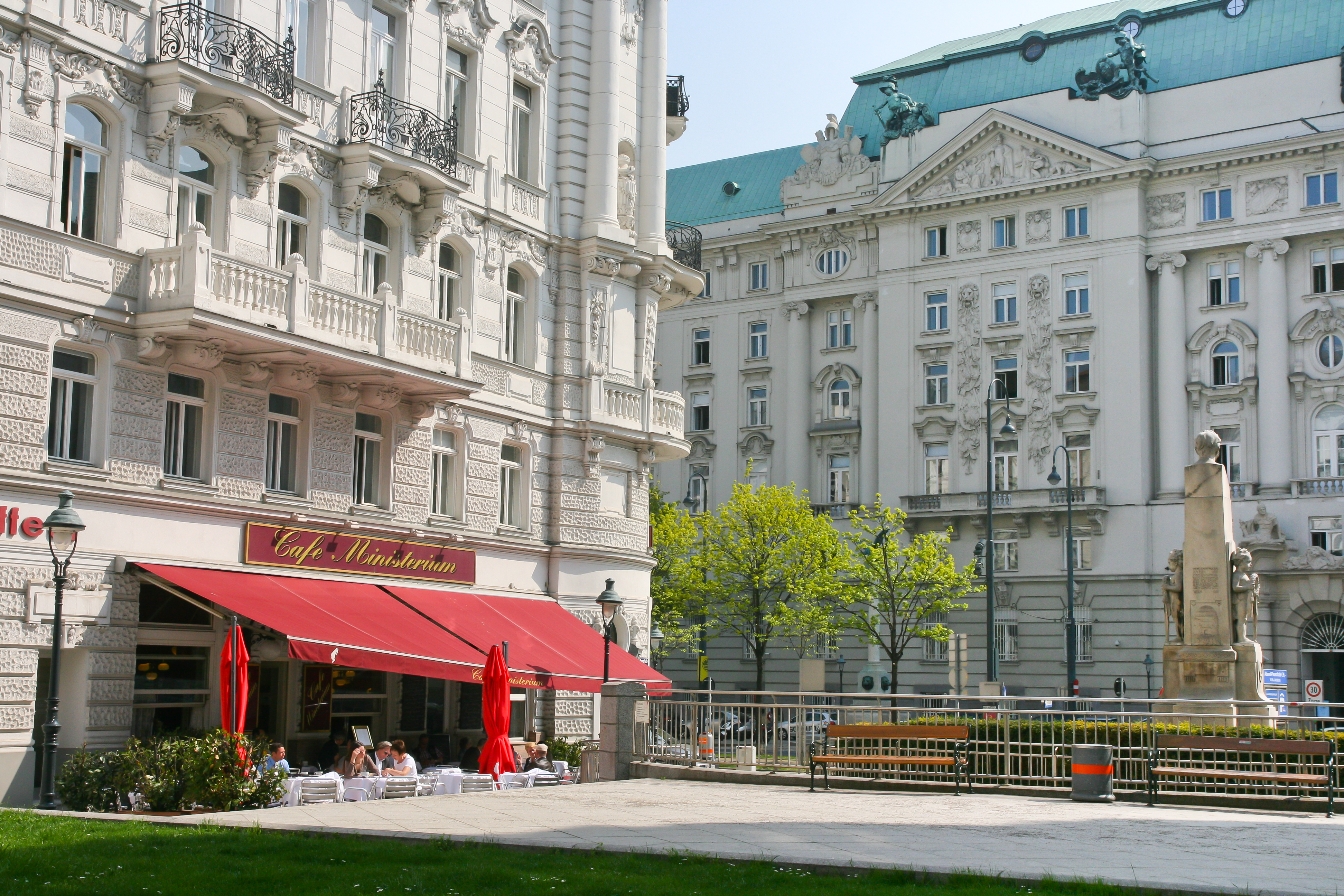 Café Ministerium am Stubenring / Georg-Coch-Platz, 1010 Wien